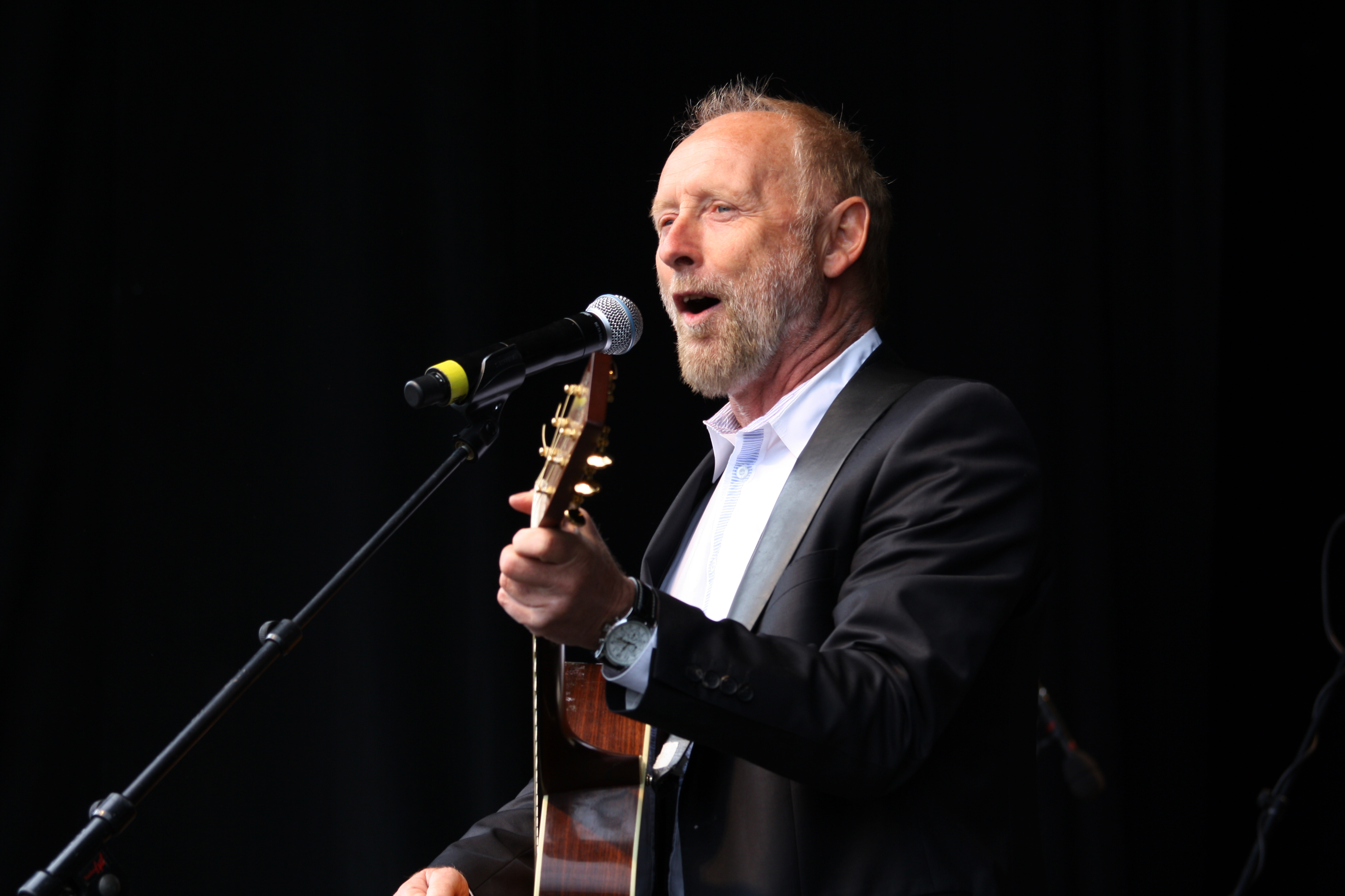 Hurtigruteentusiast Halvdan Sivertsen spilte, sang og slo vitser til stor glede for de fremmøtte.